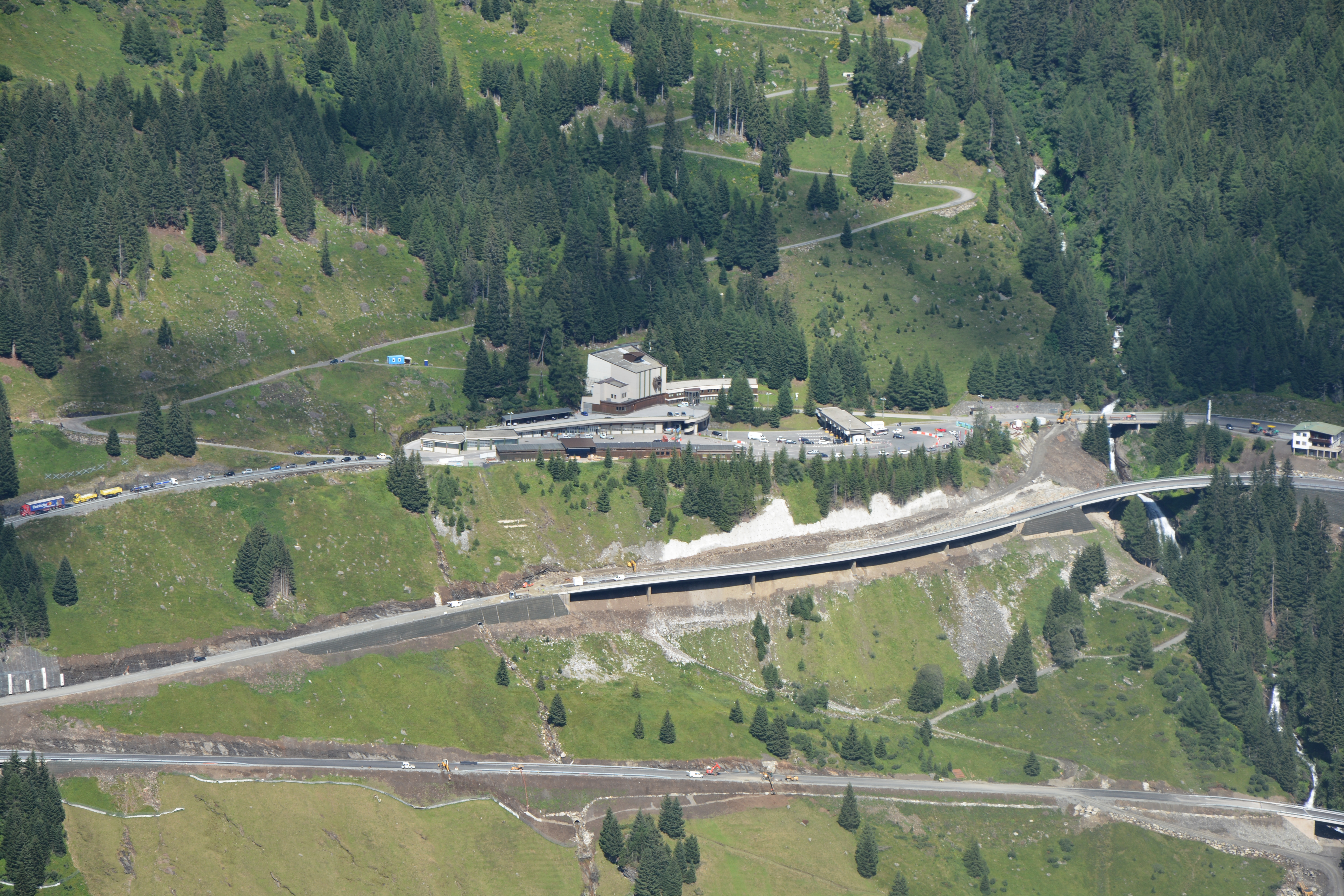 Südportal des Felbertauerntunnels, gesehen vom Wildenkogelweg.